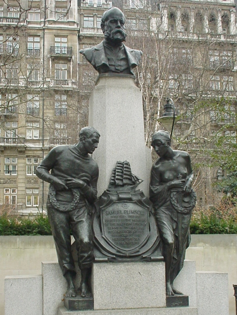 Memorial to Samuel Plimsoll on Victoria Embankment, London